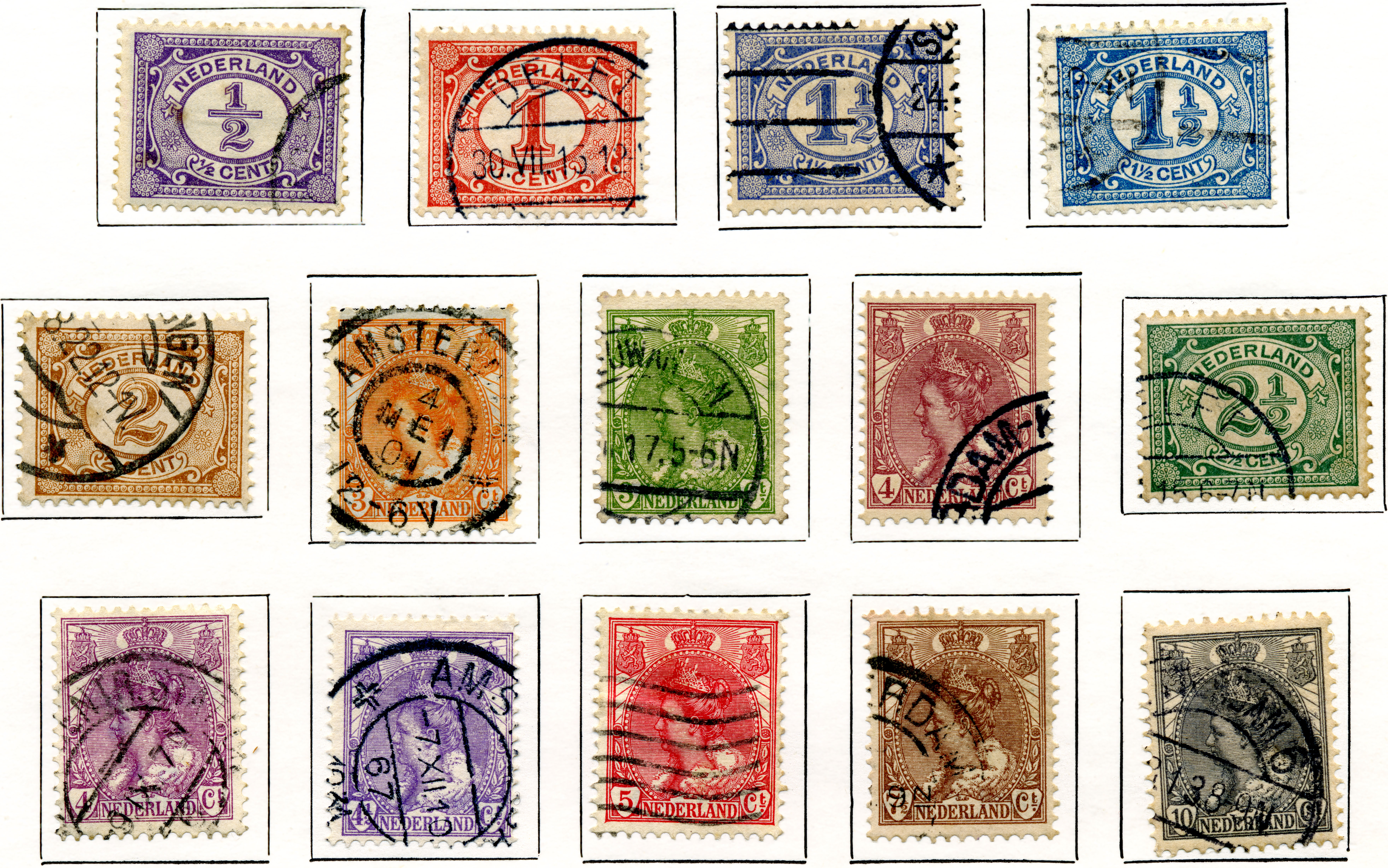 zegels met cijfer (1899-1913) en Koningin Wilhelmina 3 - 10 cent (1899-1921)